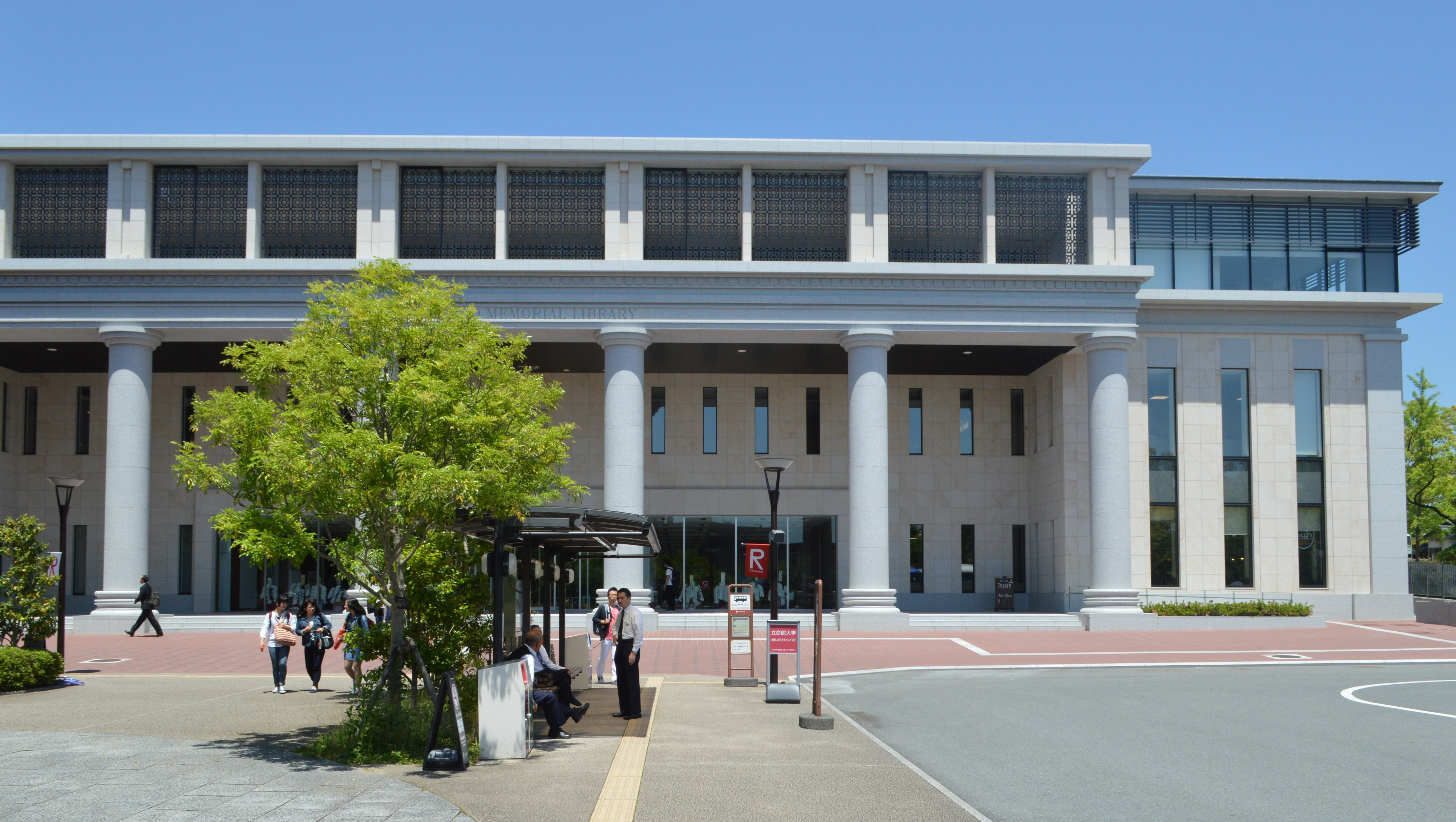 京都市北区の立命館大学衣笠キャンパスにある平井嘉一郎記念図書館。